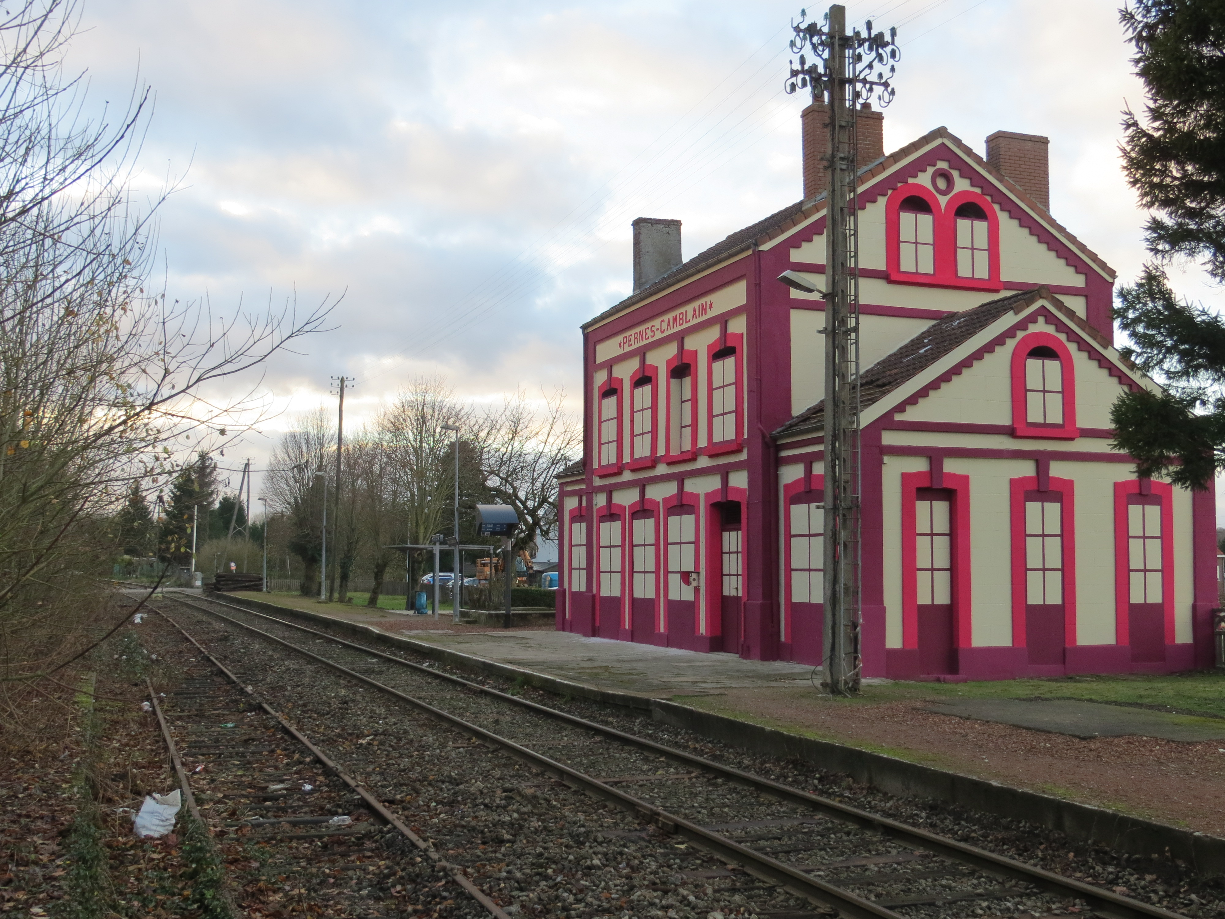 quai de la gare de Pernes-Camblain